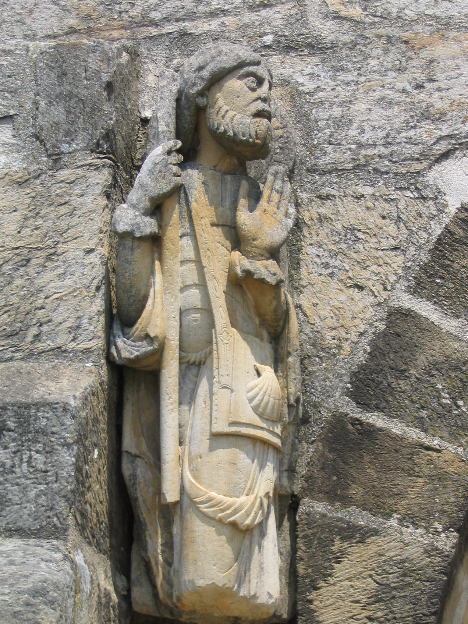 Petite statue de St-Jacques en pèlerin a Santa Marta de Tera ( route de la Plata, Espagne)